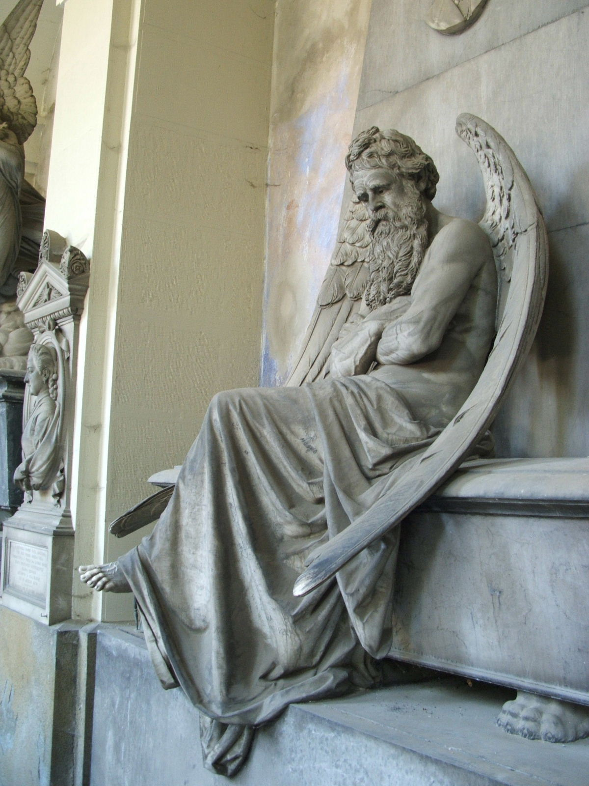 Erasmo di Giuseppe Piaggio grave: Chronos, God of time, by Santo Saccomanno, 1876, Cimitero monumentale di Staglieno, Genova